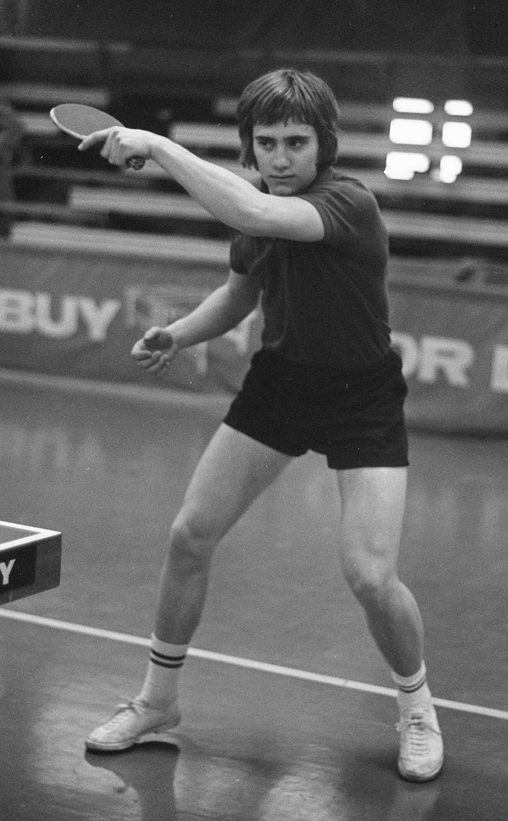 Training voor Europese tafeltenniskampioenschappen in Energiehal te Rotterdam; wereldkampioen Stellan Bengtsson (Zweden) in actie